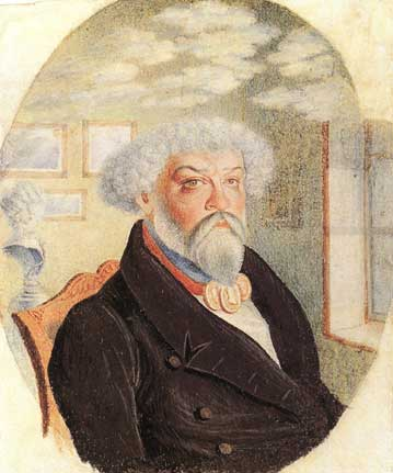 Григорий Зотов 1830-е гг.